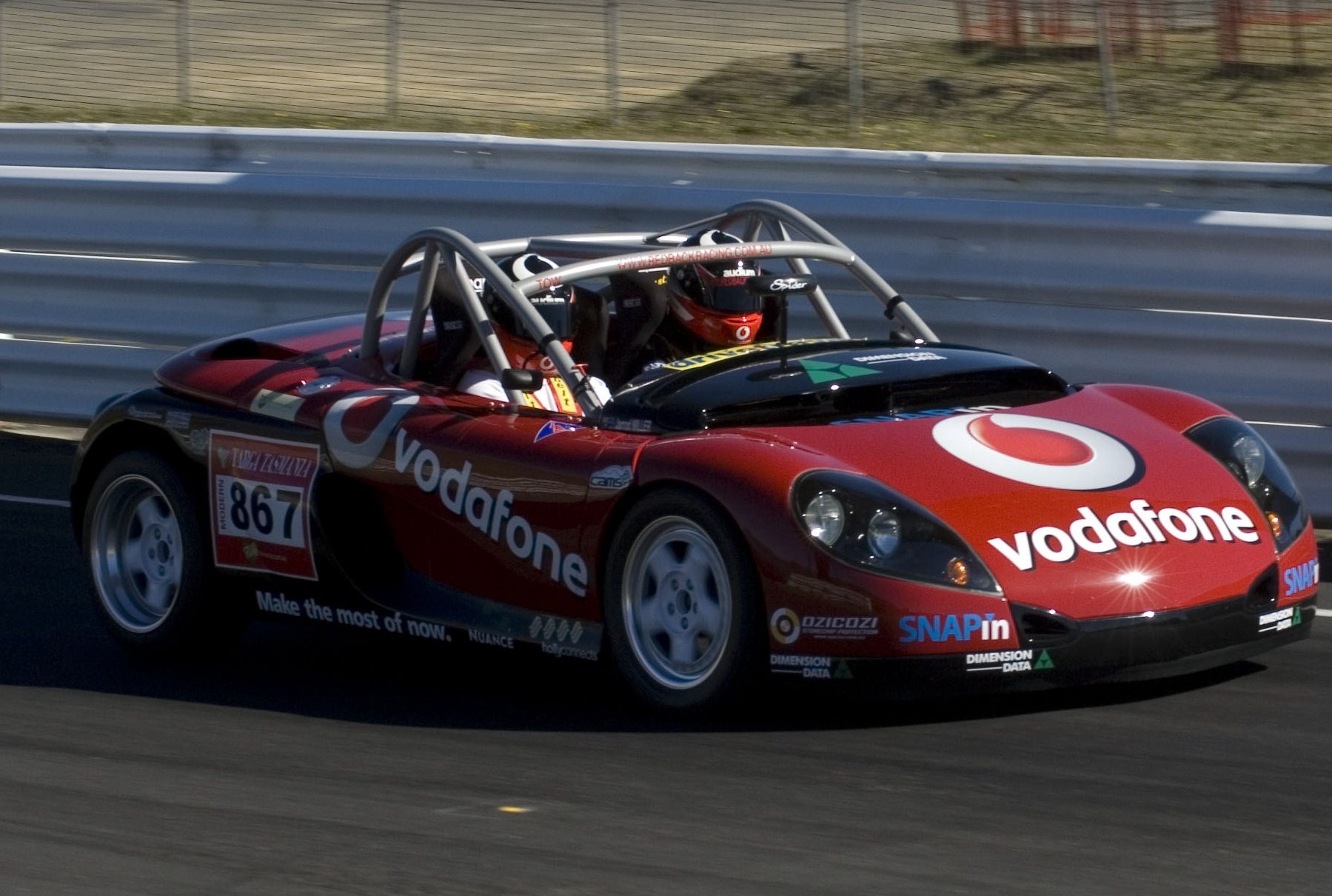 Dave Colvin ( .au)